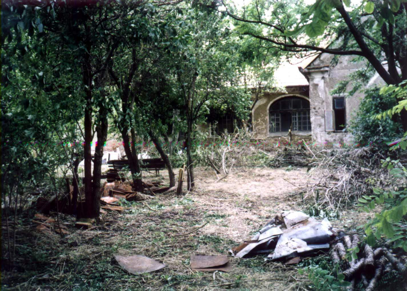 Besnyői plébániaház